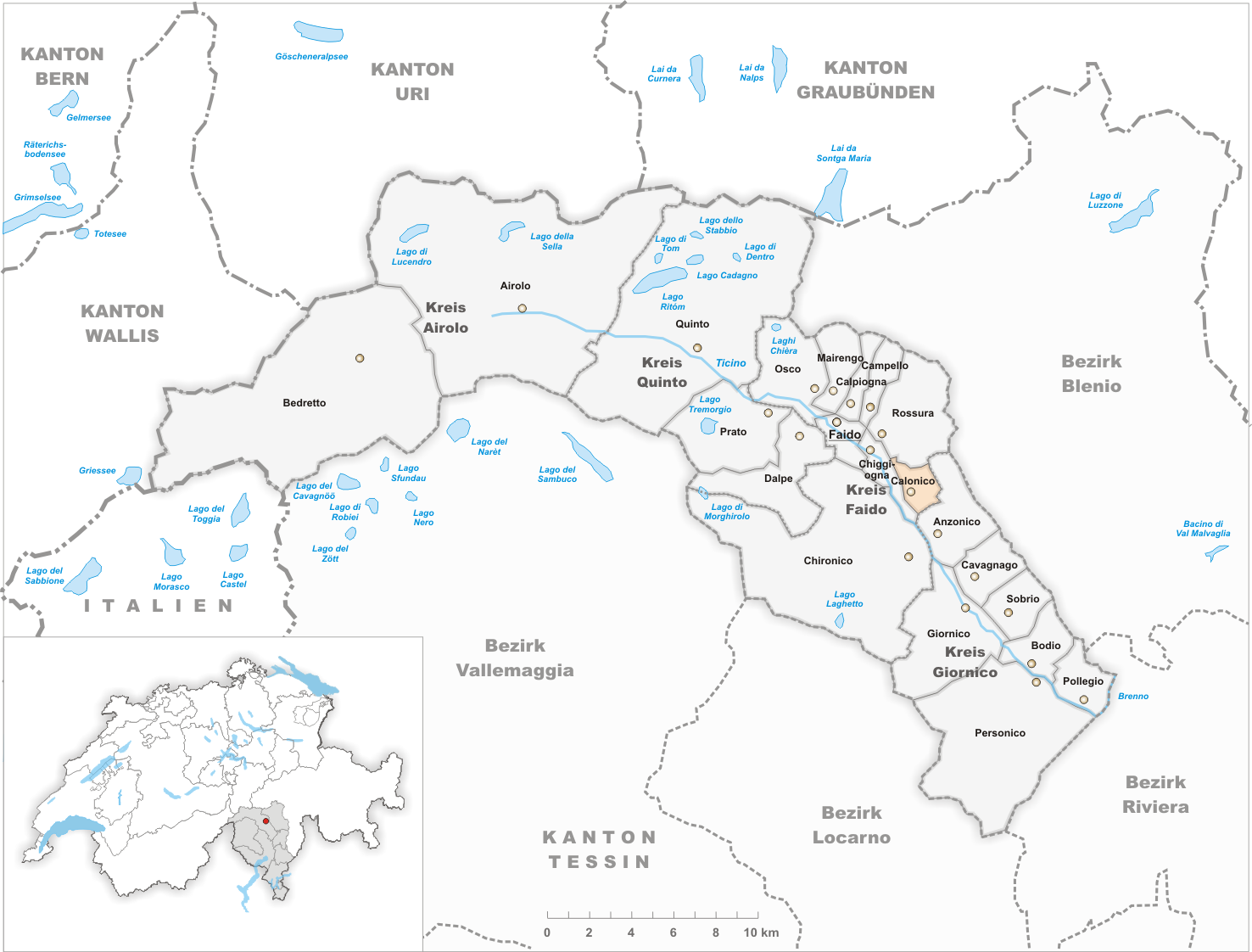 Municipality Calonico